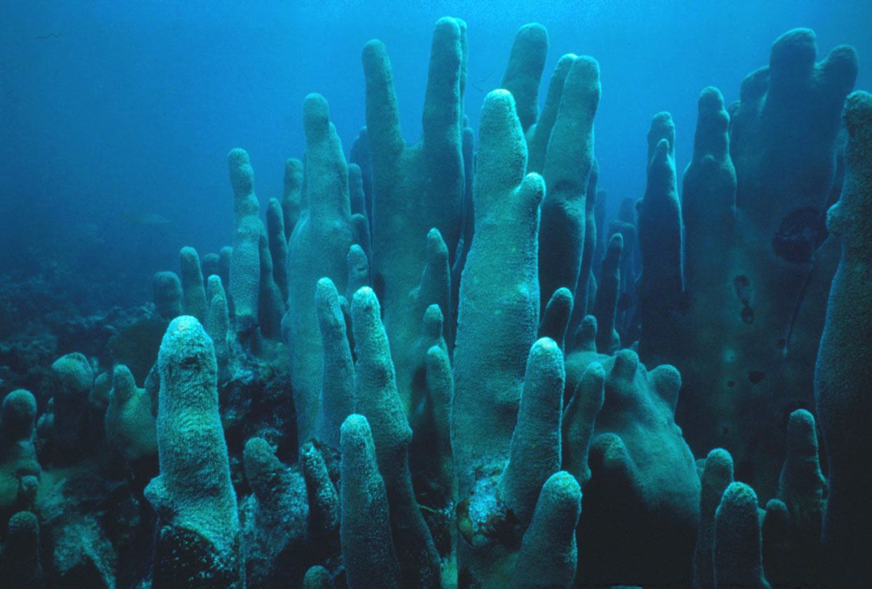 Stony coral Dendrogyra cylindrus